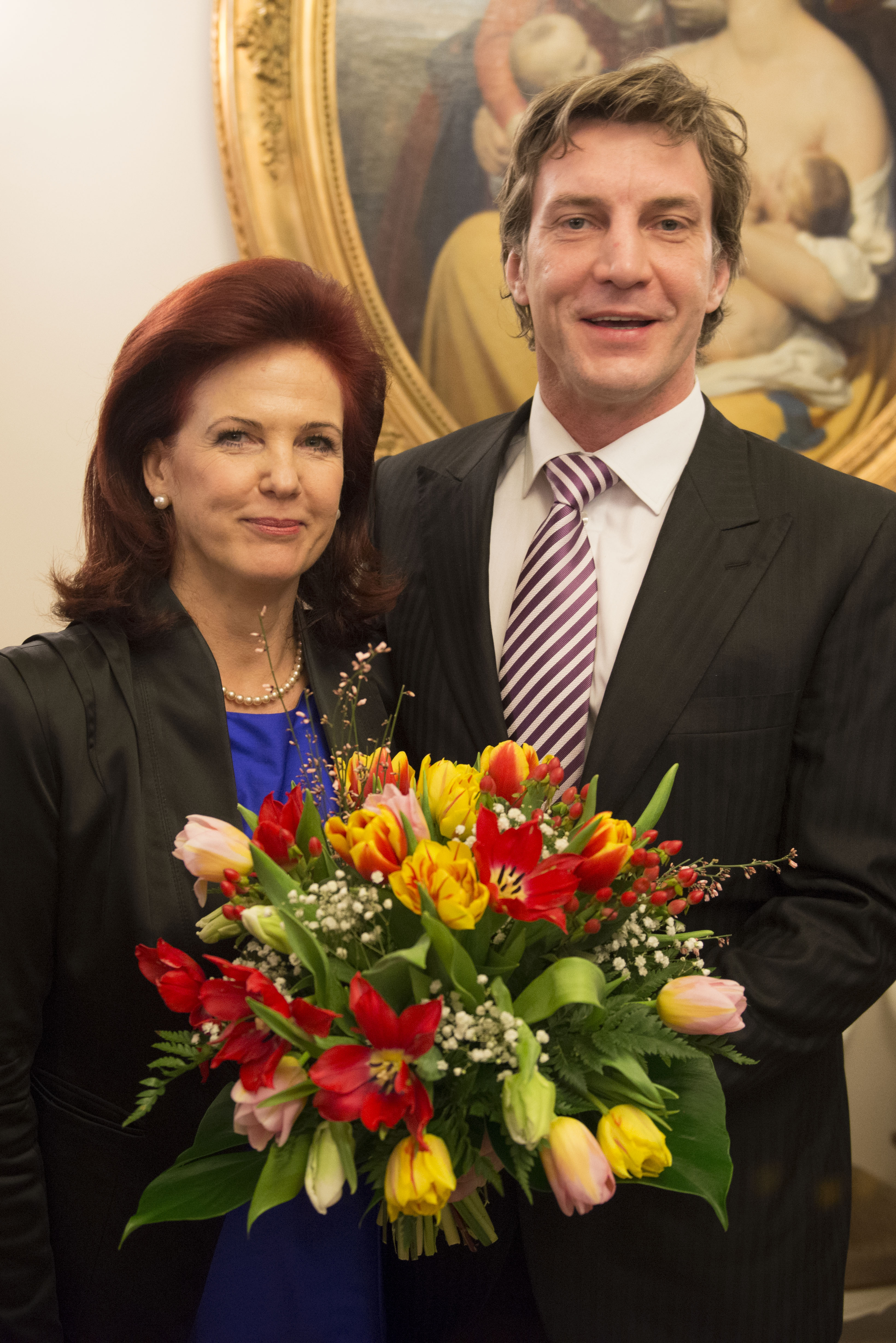 2014.gada 27.februāris. Saeimas priekšsēdētāja Solvita Āboltiņa tiekas ar Latvijas olimpisko komandu XXII Ziemas olimpiskajās spēlēs Sočos. Foto: Reinis Inkēns, Saeimas Kanceleja Izmantošanas noteikumi: saeima.lv/lv/autortiesibas